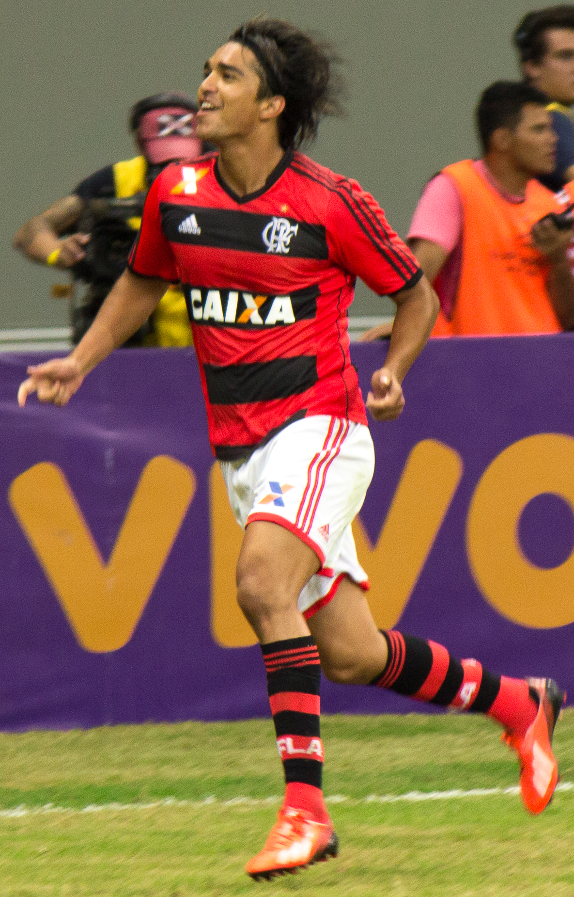 Gol de Marcelo Moreno na empate de 2x2 com o Coritiba.